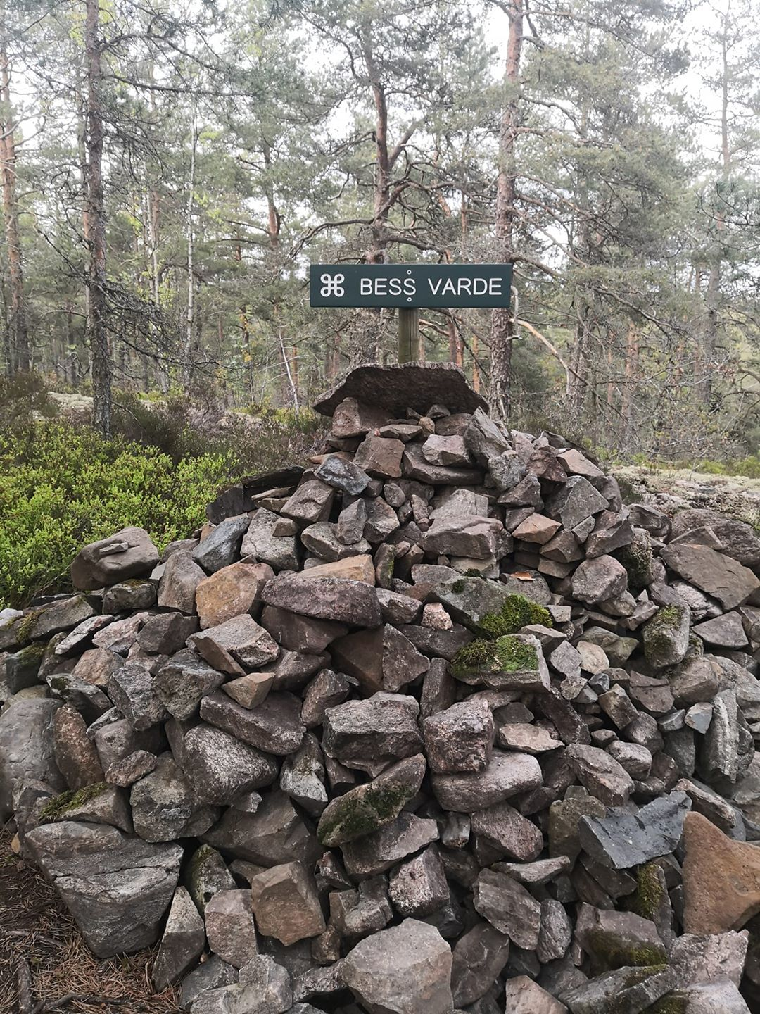 Varden nesten på toppen av Kjerkåsen